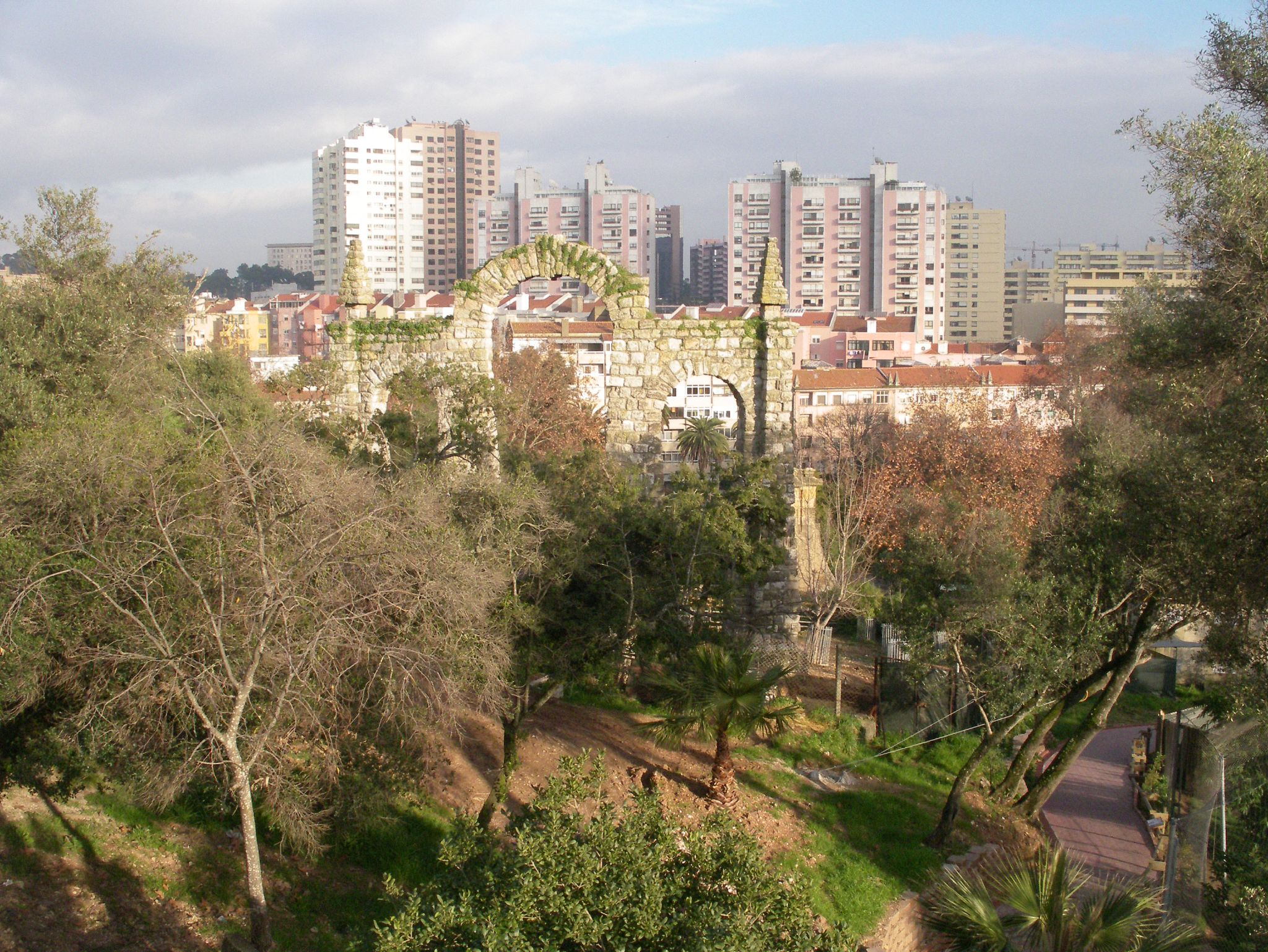 Jardim Zoologico 03